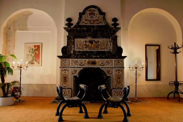 Kamin des großen Saales im neuen Teil des Schlosses. Foto von Fam. Mayerh. 2010